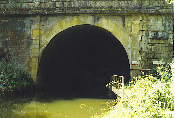 propre photo